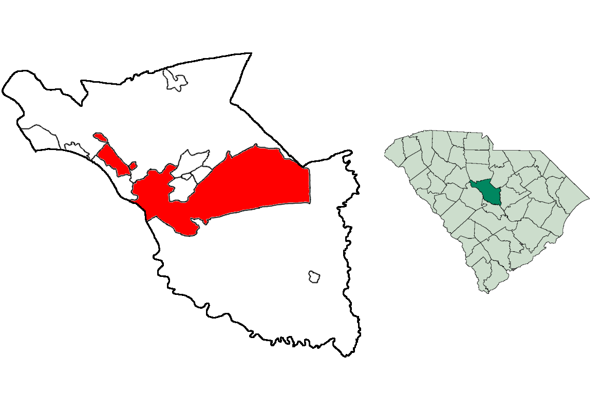 Made Using US Census Bureau Data.